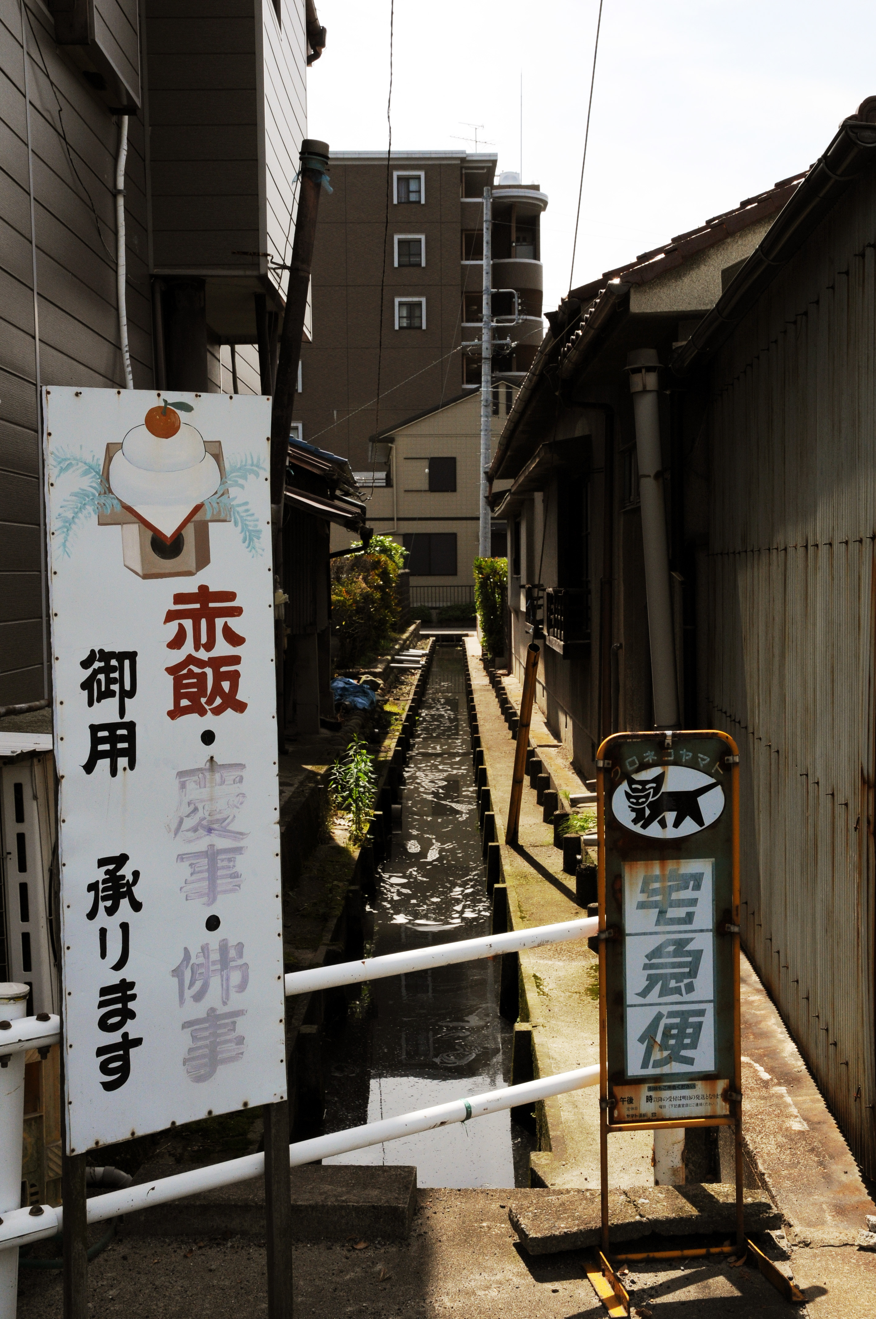 Jun 1, 2008 at 14:04, AICHI 妙興寺